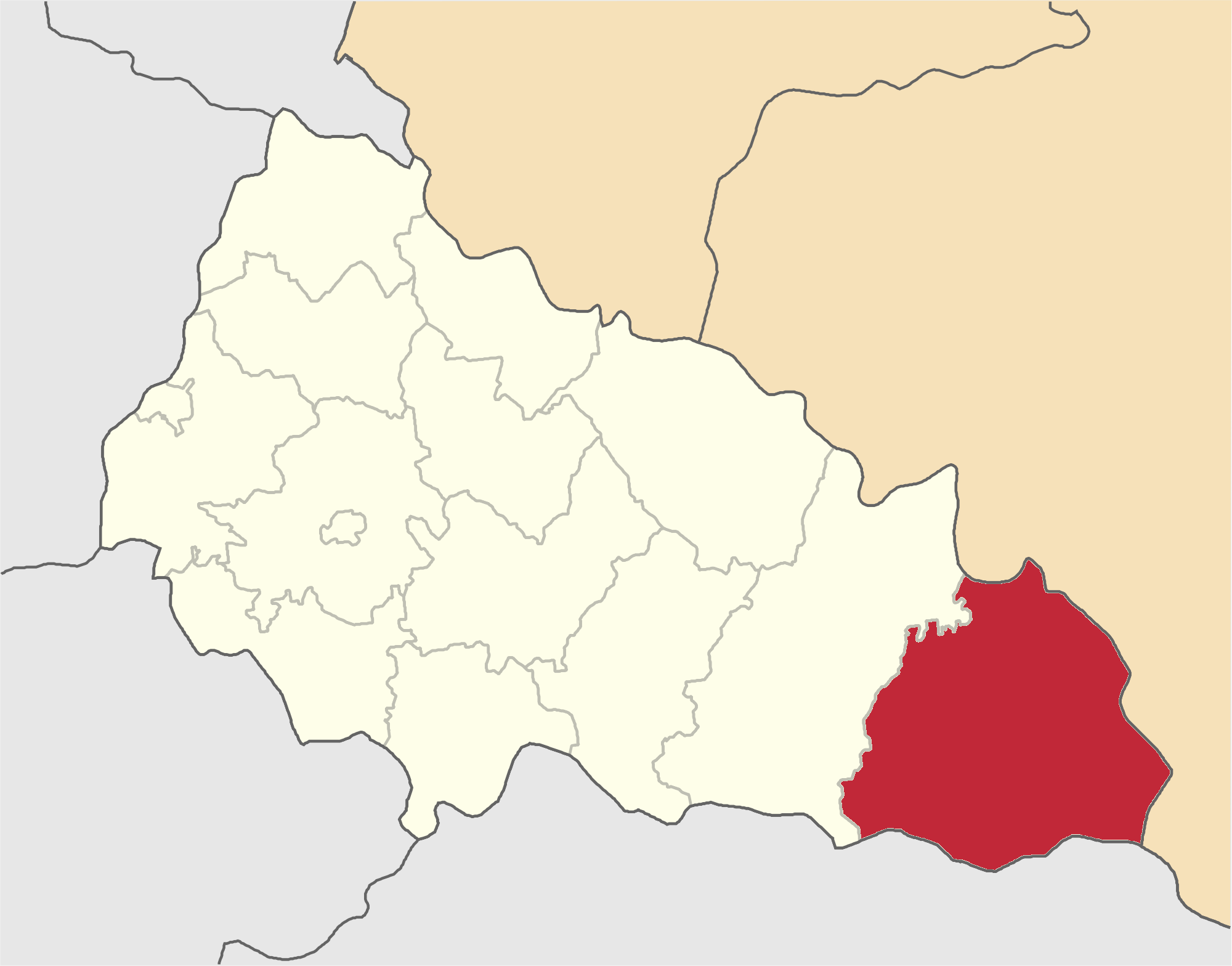 Rahivskyi-Raion map